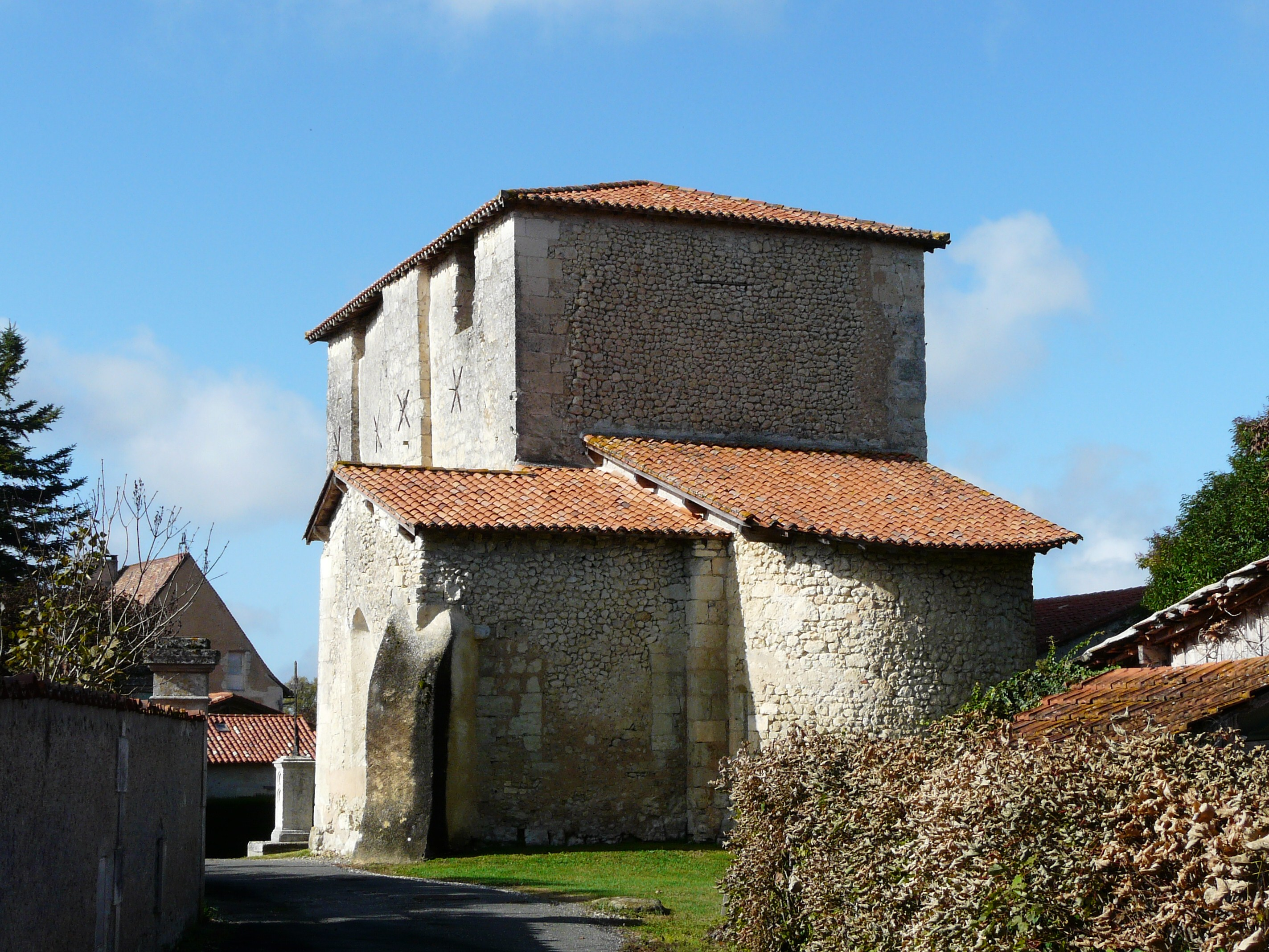 L'église Saint-Martial, Ribérac, Dordogne, France